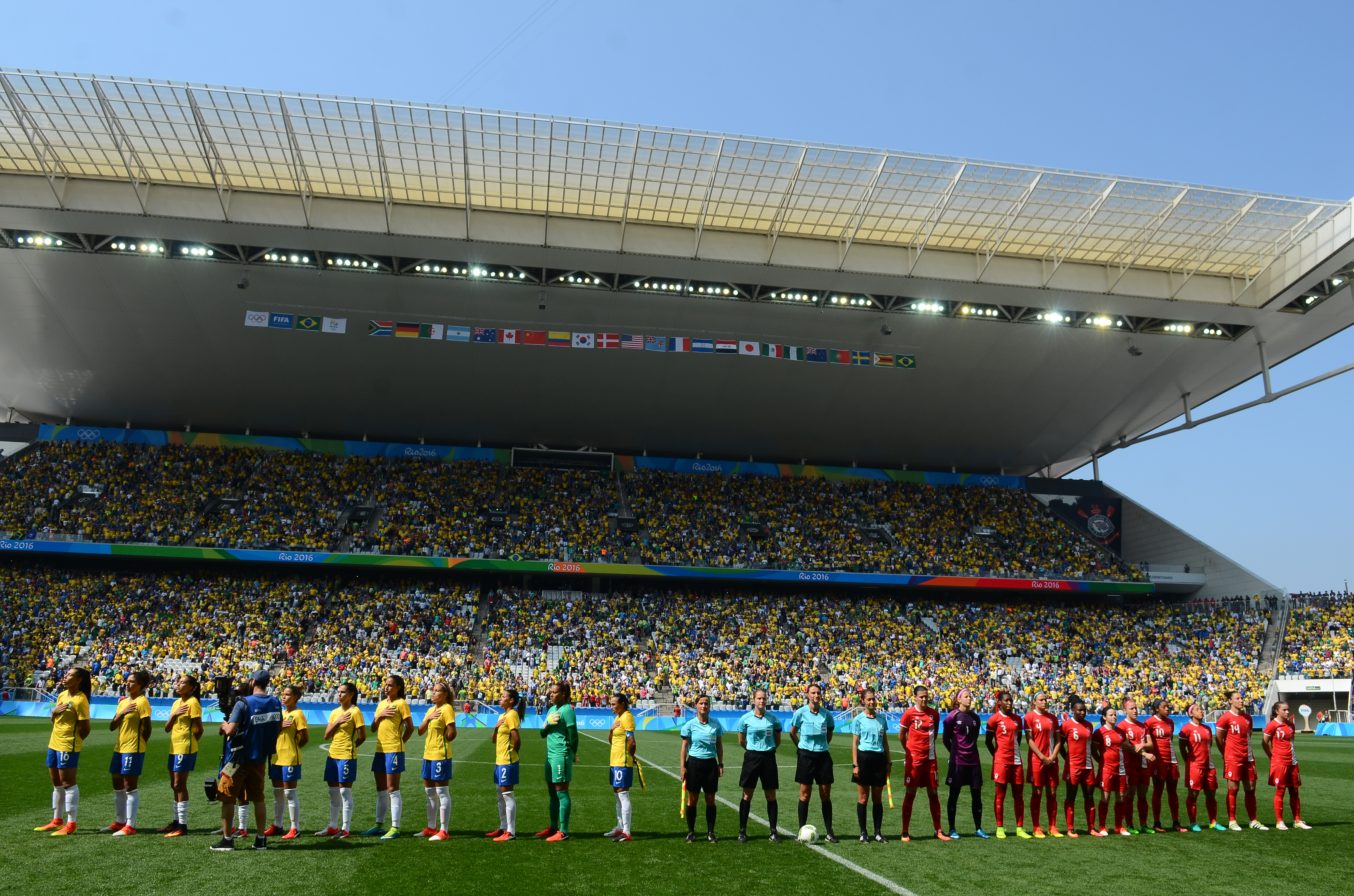 São Paulo - Canadá vence o Brasil por 2 a 1 e fica com a medalha de bronze no futebol feminino dos Jogos Olímpicos, na Arena Corinthians (Rovena Rosa/Agência Brasil)